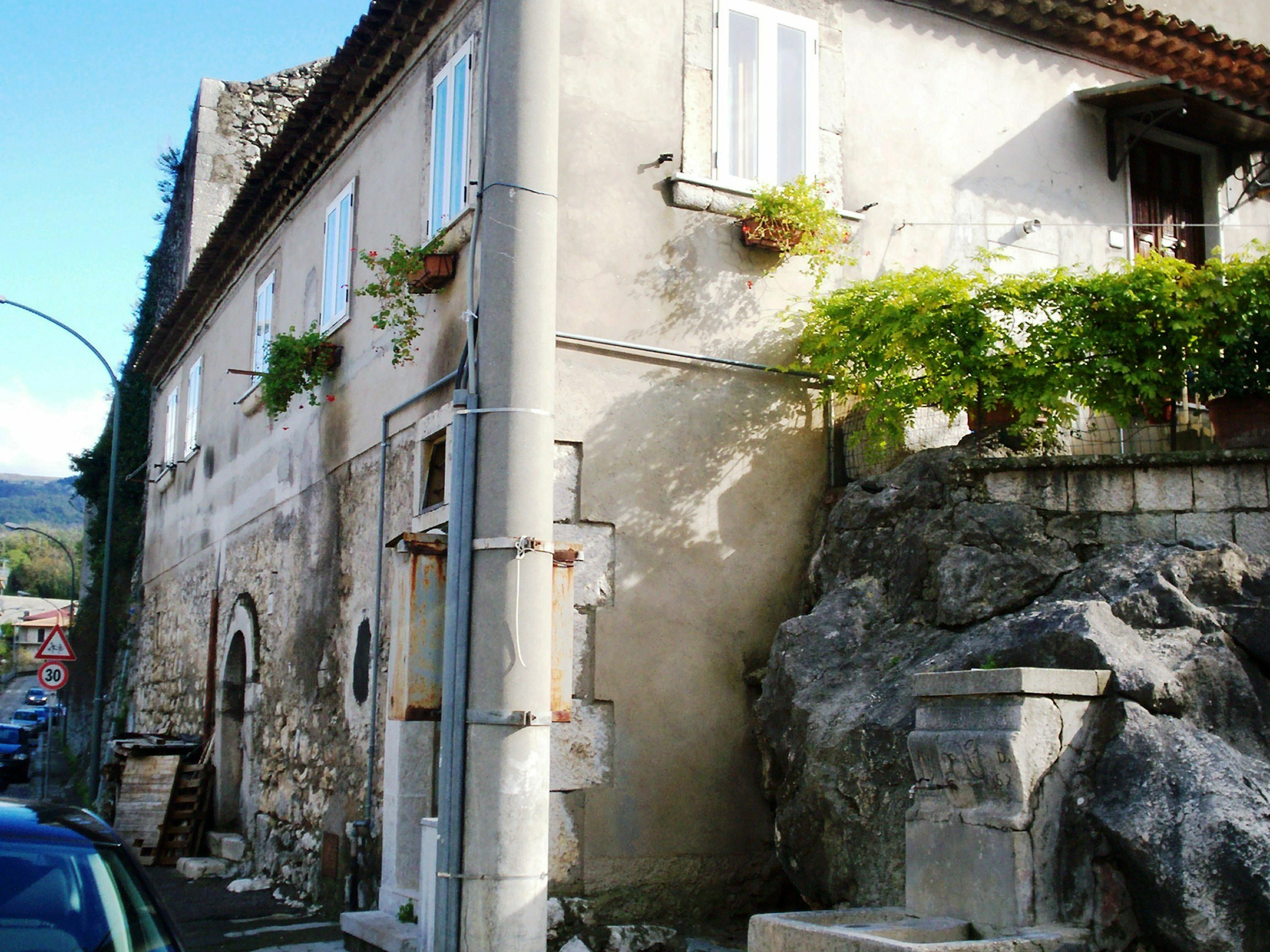 Casa del brigante Cosimo Giordano in Cerreto Sannita (Italia).